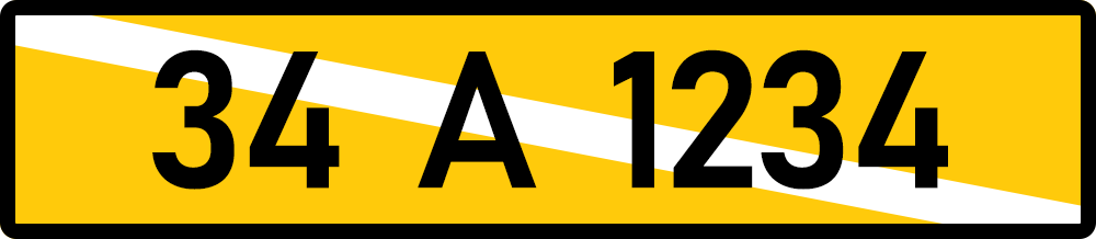 نمونه پلاک ترکیه